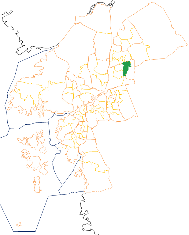 Göteborg. Primärområde 305 Västra Bergsjön